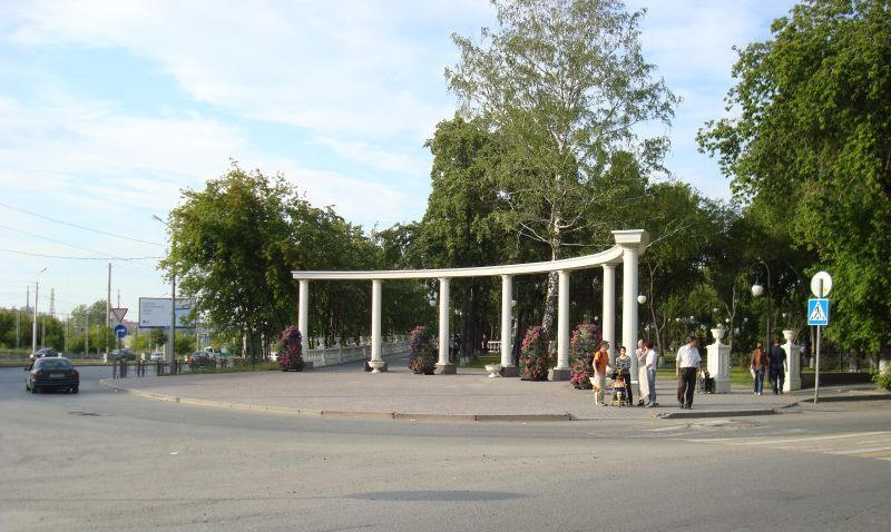 Загородный сад по ул. Профсоюзной (Тюмень)